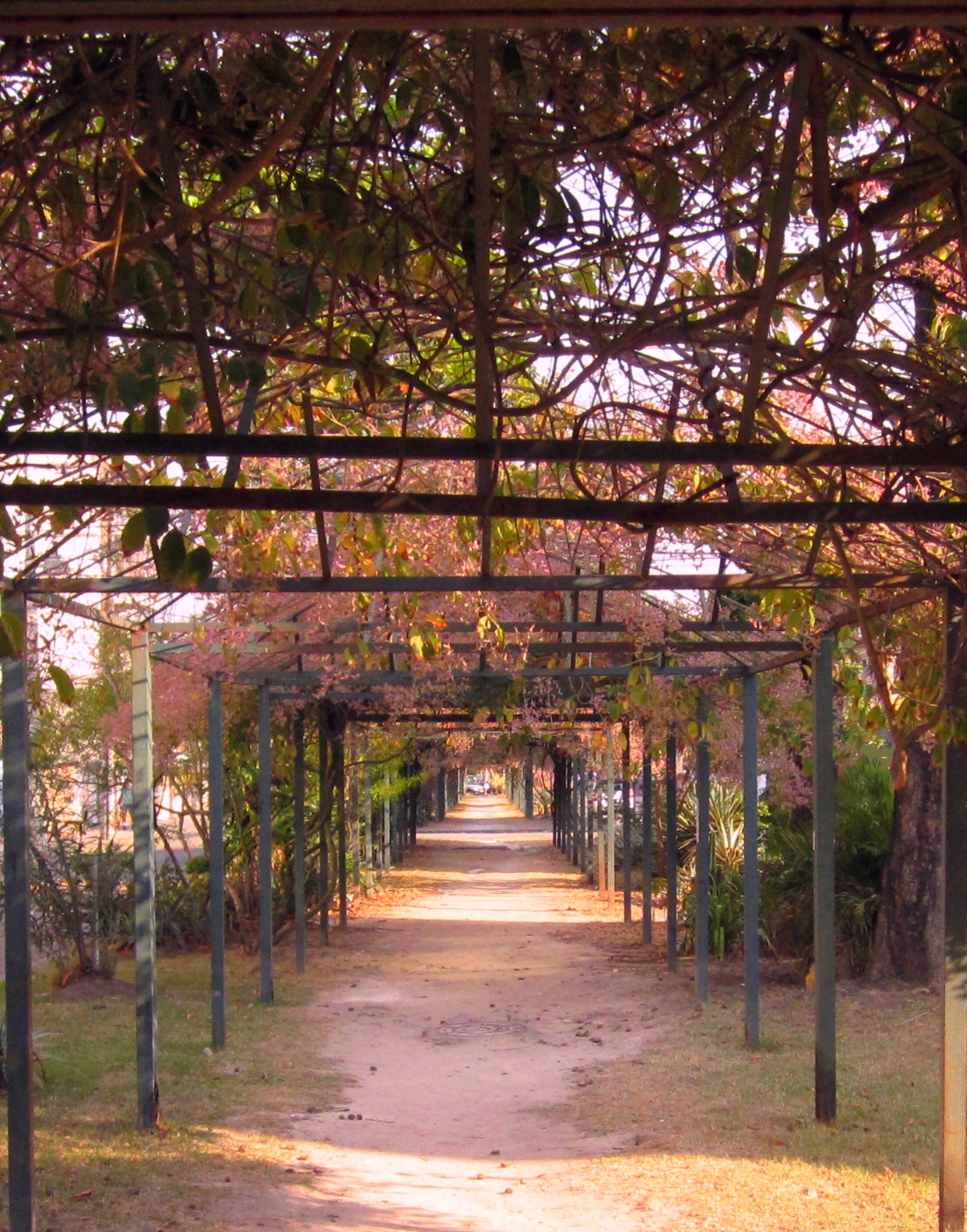 Fotografia do canteiro central da Rua Airea, em Vila Kosmos, Rio de Janeiro, Brasil.